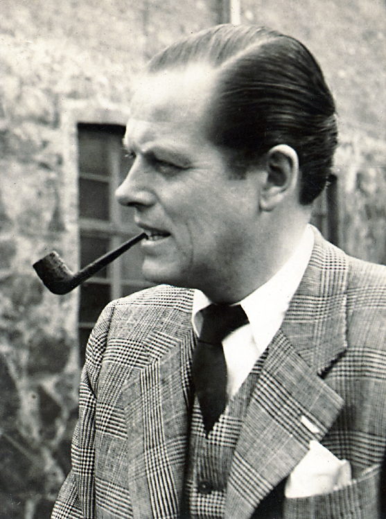 Fredrik af Klercker (1908–1969), Swedish industrialist